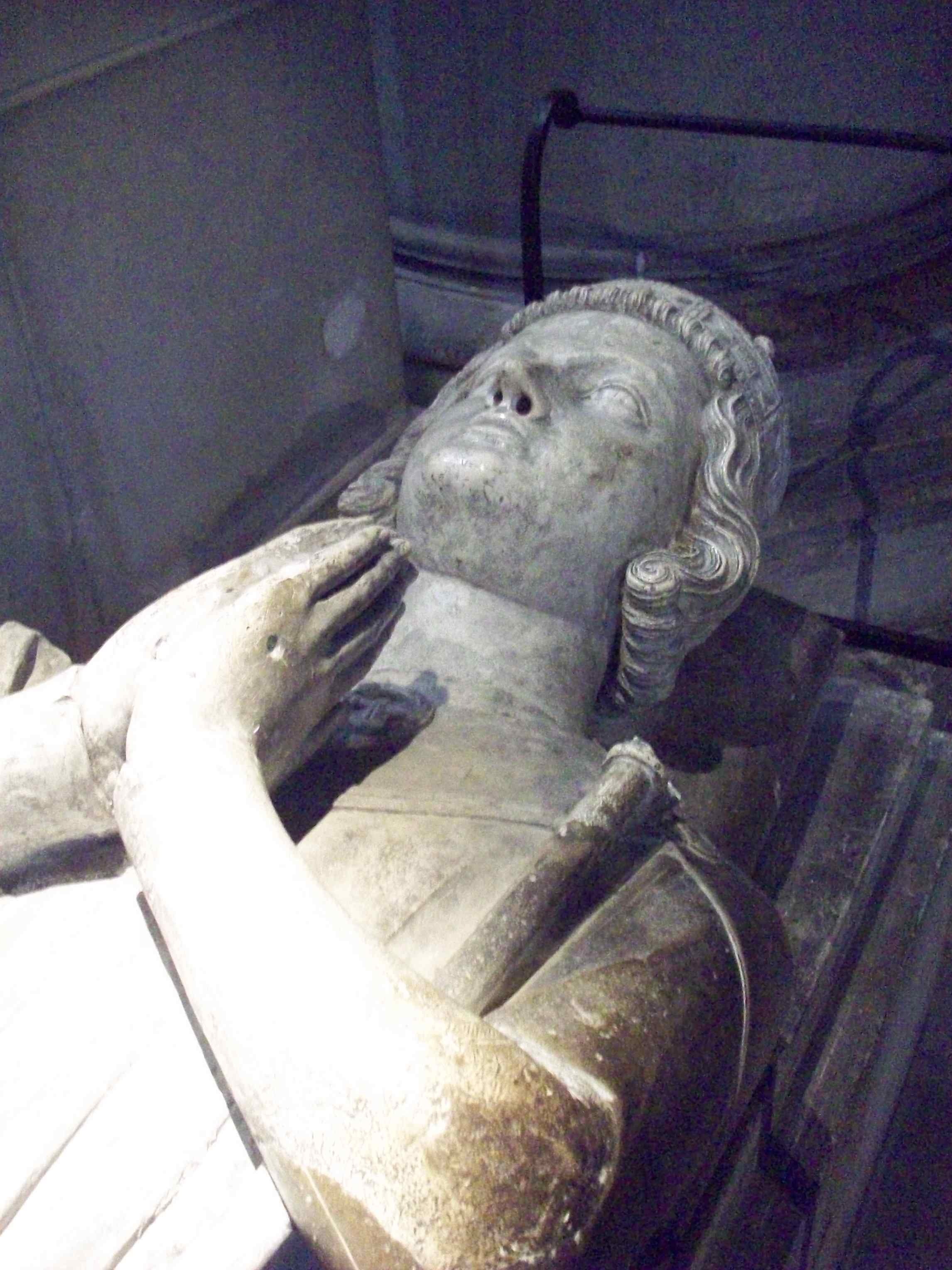 Gisant d'Henri le Jeune, dans le déambulatoire du choeur.